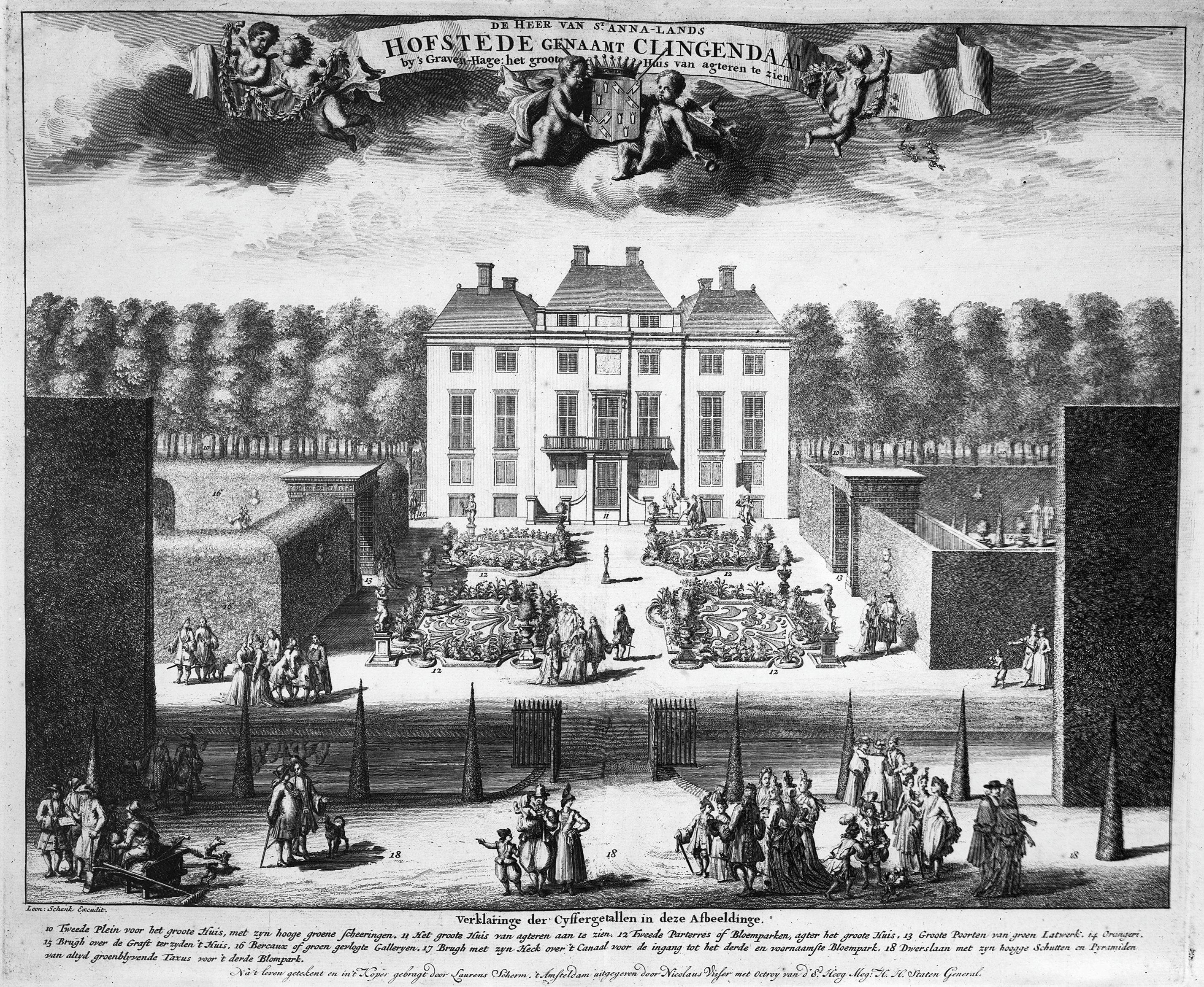 Huize Clingendael: achtergevel naar een gravure van L.Schenk